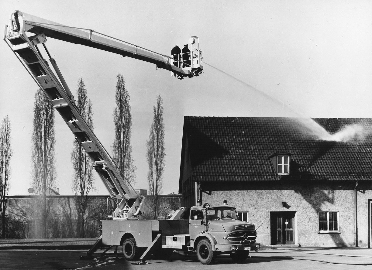 Simon Snorkel Gelenkmast auf L 1920-Chassis, 1966